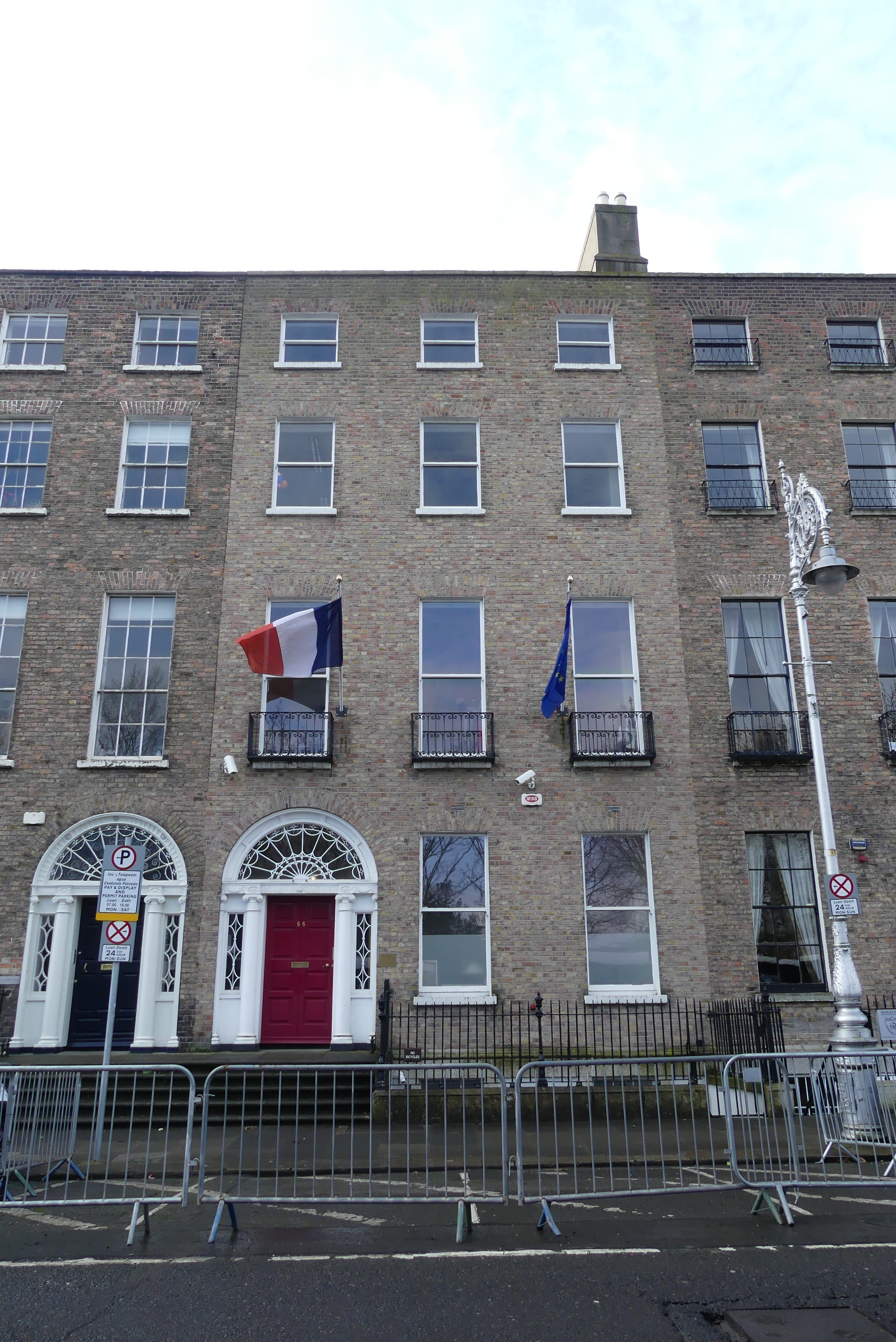 Immeuble abritant l'ambassade de France en Irlande sur Merrion Square à Dublin